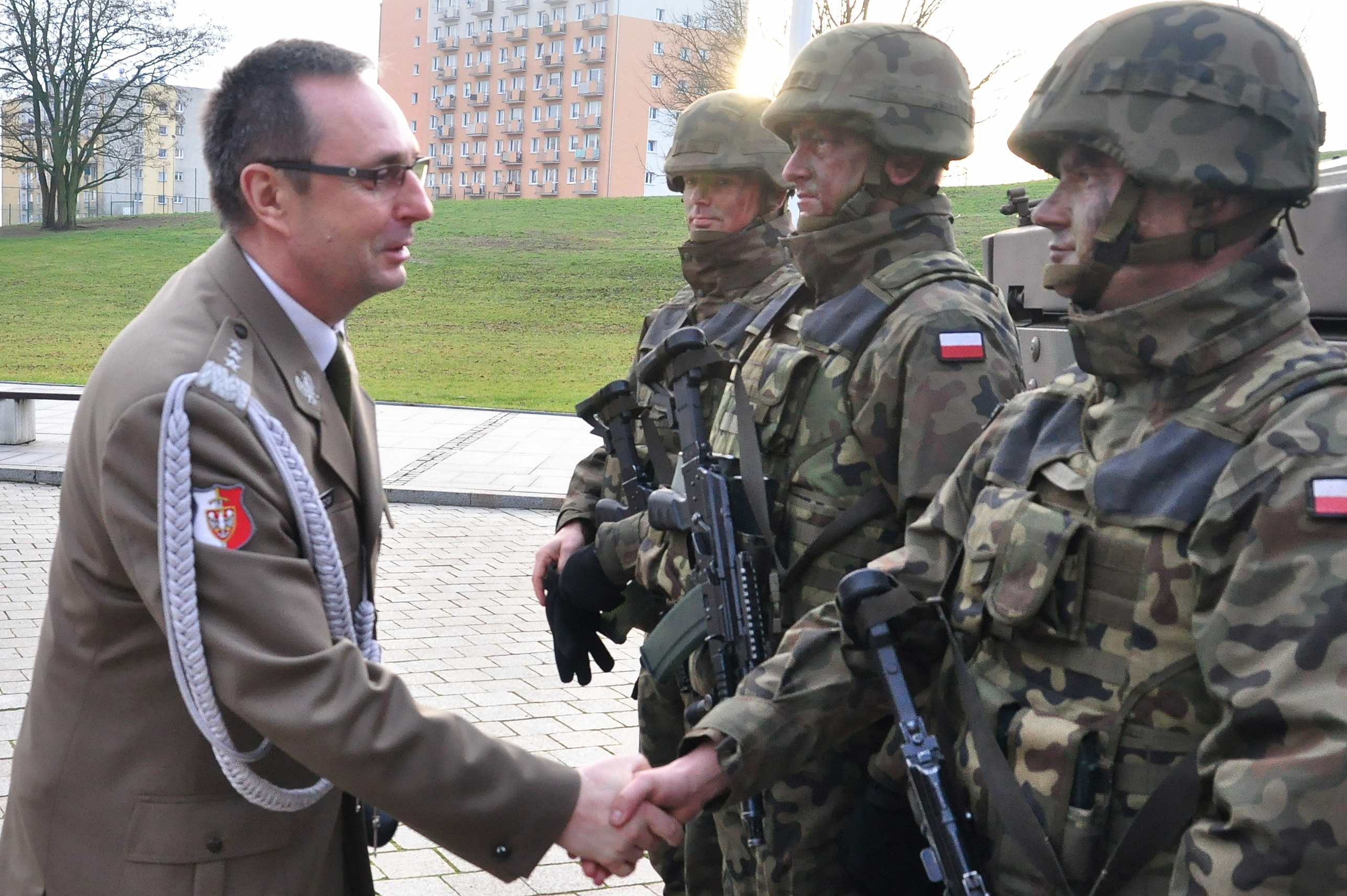 Dowódca Operacyjny Rodzajów Sił Zbrojnych, gen. Marek Tomaszycki wita się z żołnierzami w Gorzowie Wlkp.